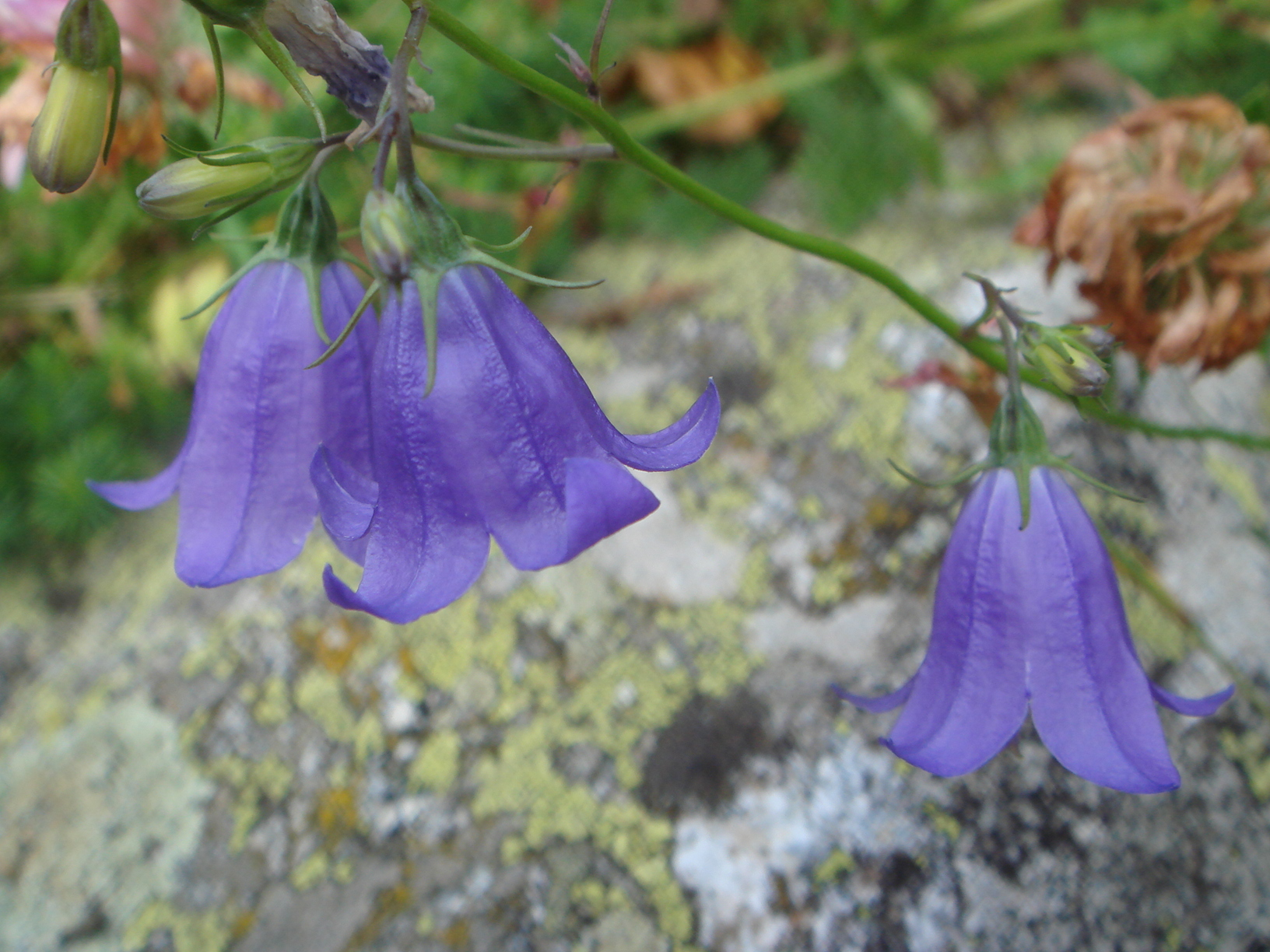 Campanula scheuchzeri, Valle de Barrosa, Pirineos (Huesca), España.